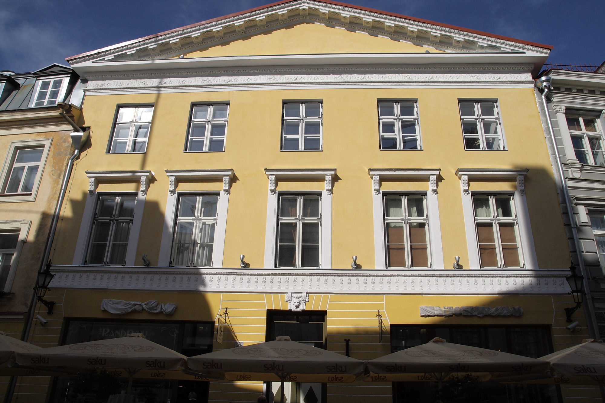 Tallinn, elamu Pikk 33, 15.-20.saj